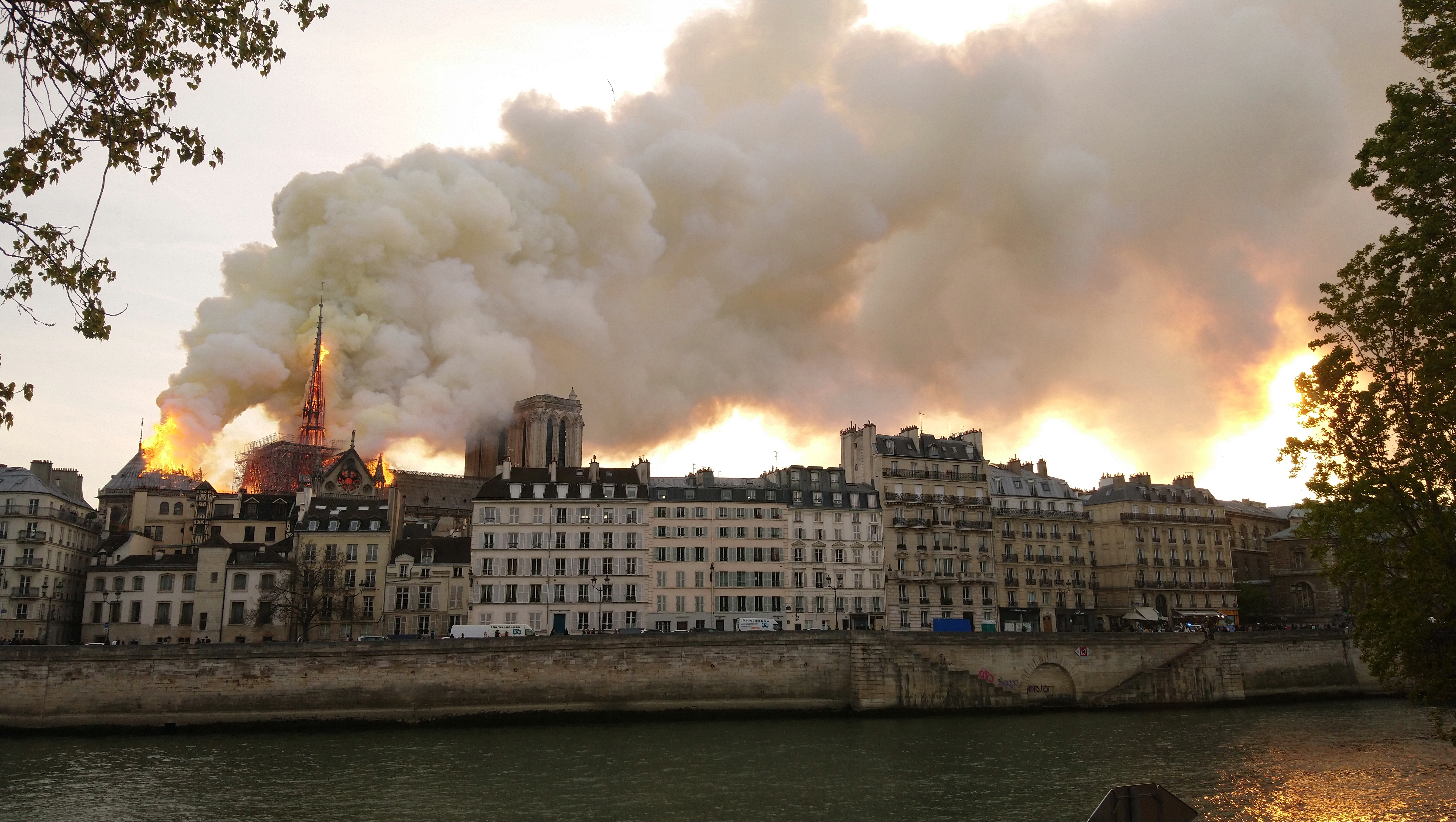 Cathédrale Notre-Dame de Paris, Incendie 15 avril 2019, vu du Quai de l'Hôtel de Ville